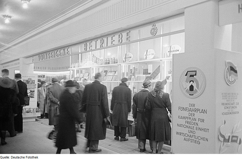 Original image description from the Deutsche Fotothek Besucher vor einem Schaufenster mit Produkten der Firma Mauxion Schokoladenfabrik